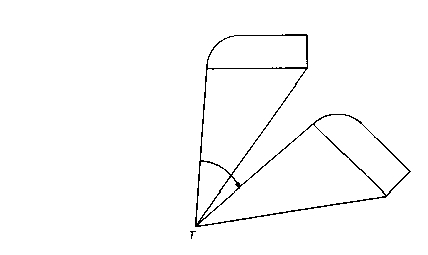 Seriaalne meetod. Geomeetrilise kujundi rotatsioon ümber punkti T